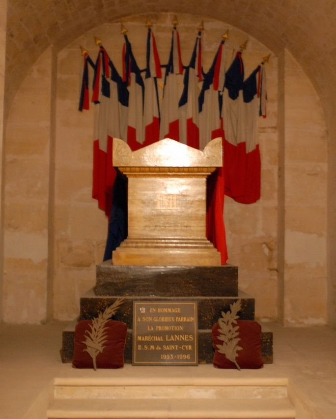 Tombeau de Jean Lannes (1769-1809) au Panthéon de Paris, France.